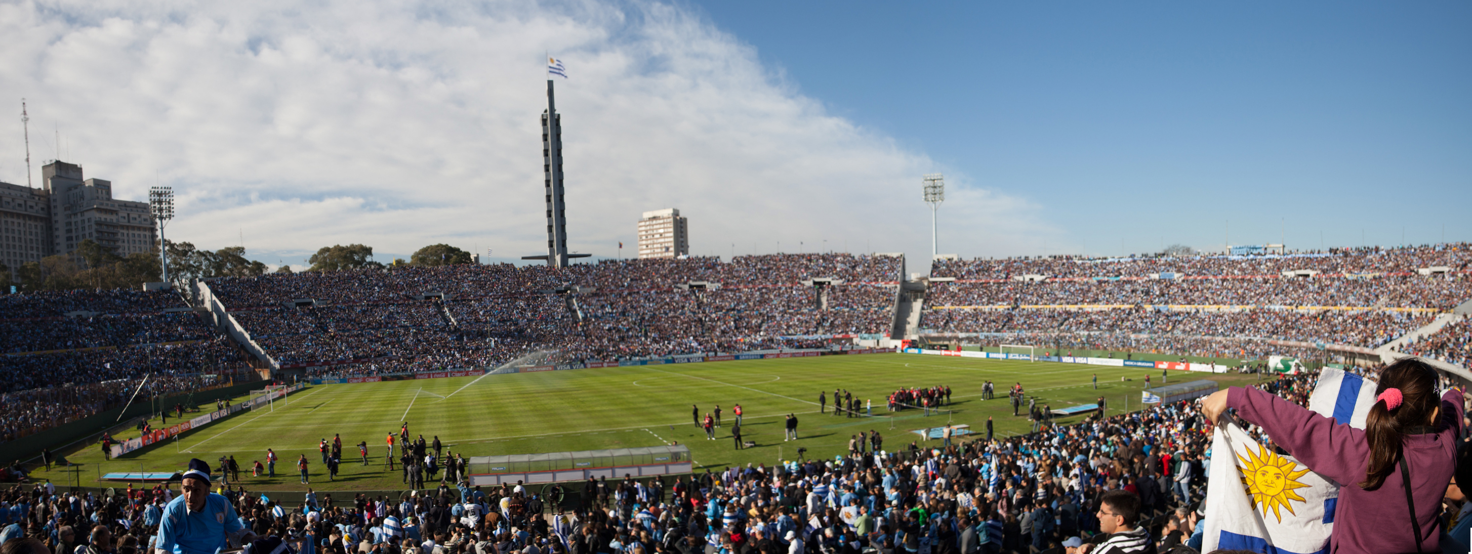 Panorame of Estadio Centenario 2 june 2012.